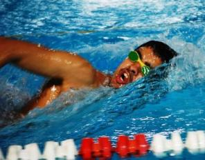 El nadador paralímpico Enhamed Enhamed durante un entrenamiento en Madrid